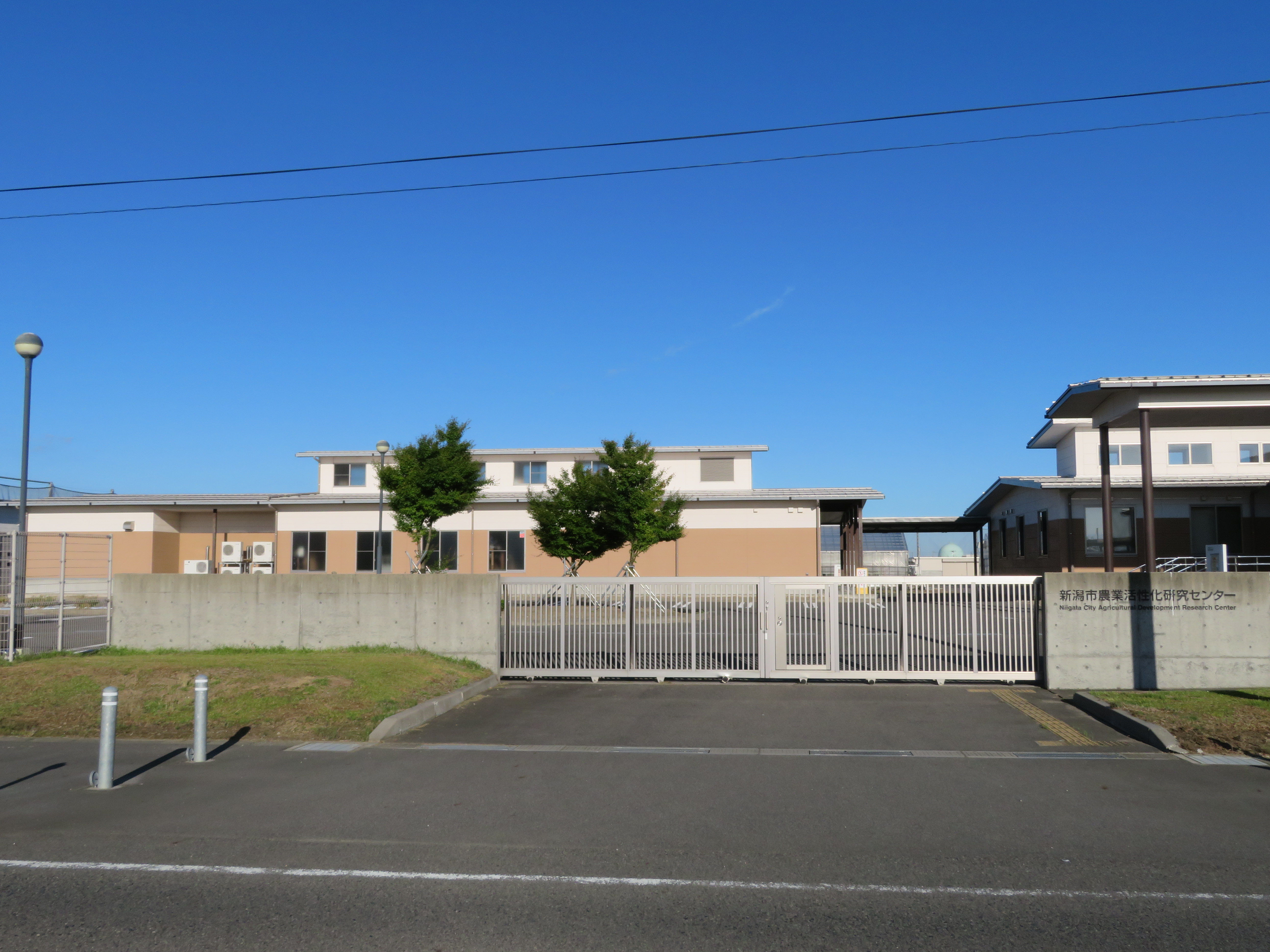 新潟県新潟市南区に所在する新潟市アグリパーク Canon PowerShot SX720 HS